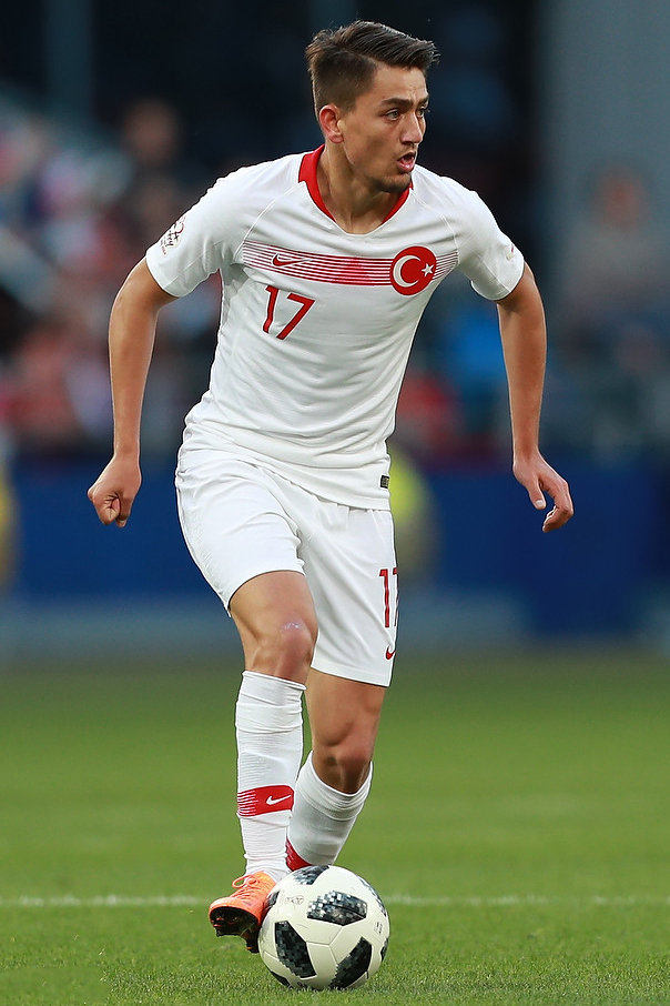 Россия при невыразительной игре расписала мировую с Турцией